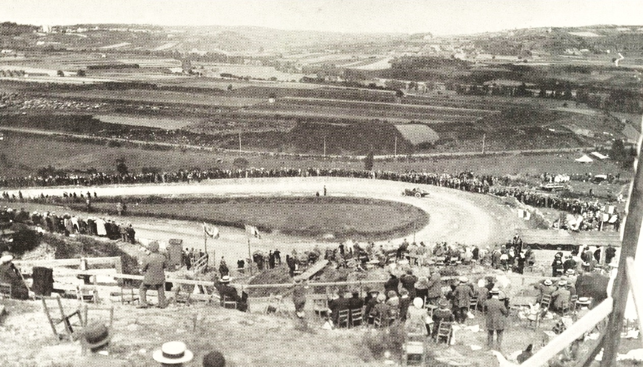 Le circuit de Lyon (GP de l'A.C.F. 1914) (La Vie au Grand Air du 11 juillet 1914, p.625)